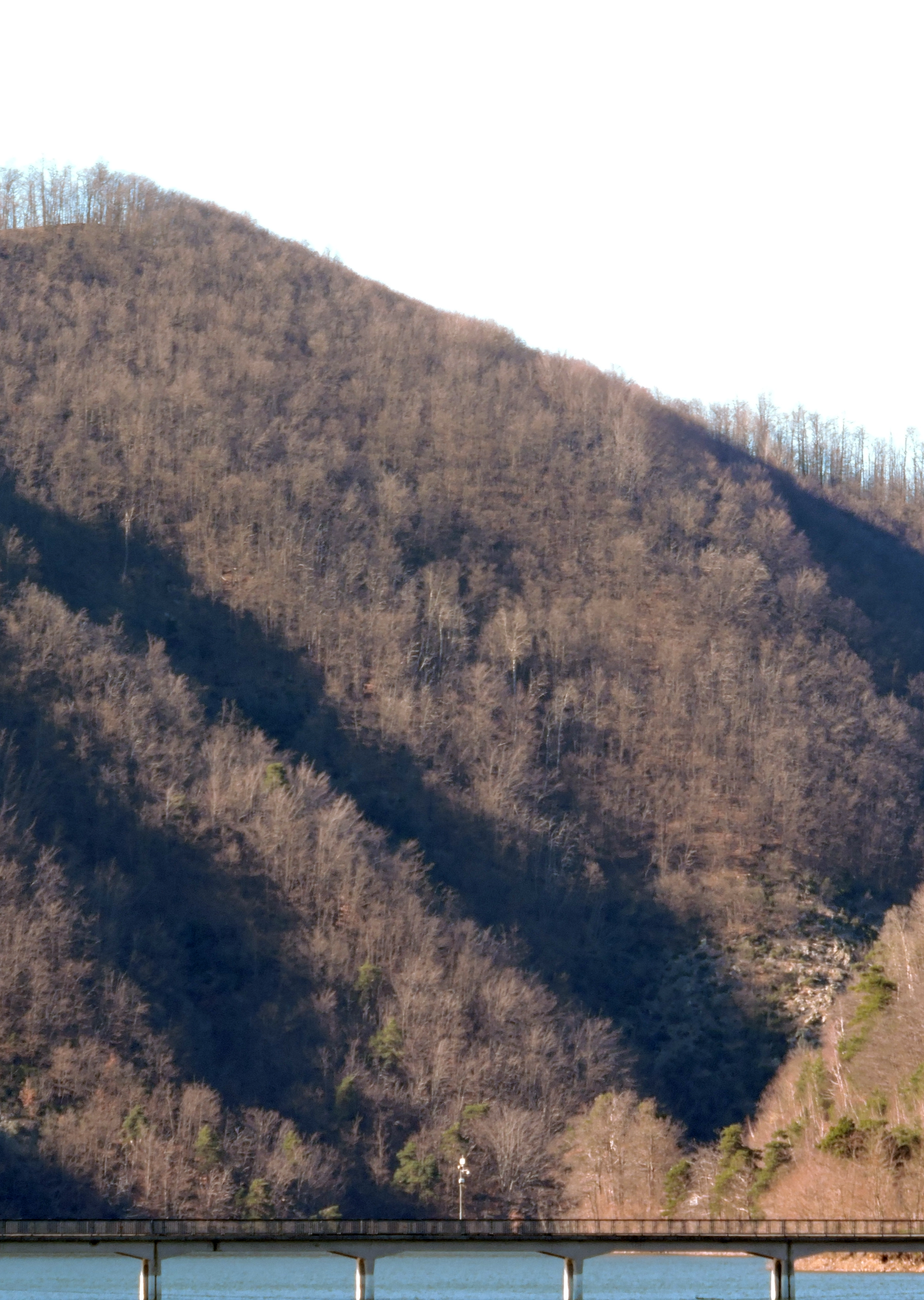 Lago di Osiglia (Q47508263)